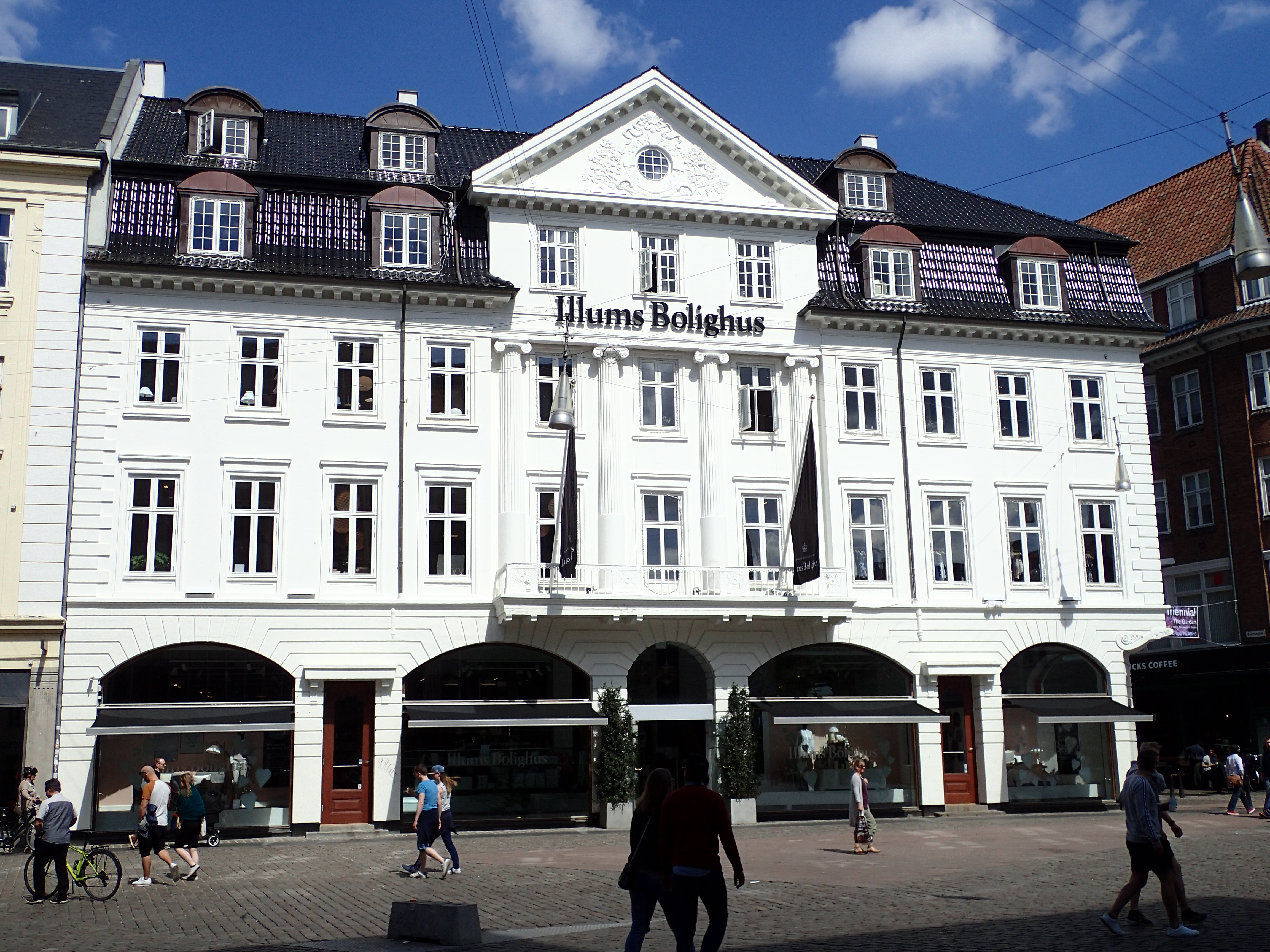 Det Hvide Palæ, Lille Torv 2. Hovedbygning og sidst opførte af Det Meulengrachtske Palæ.